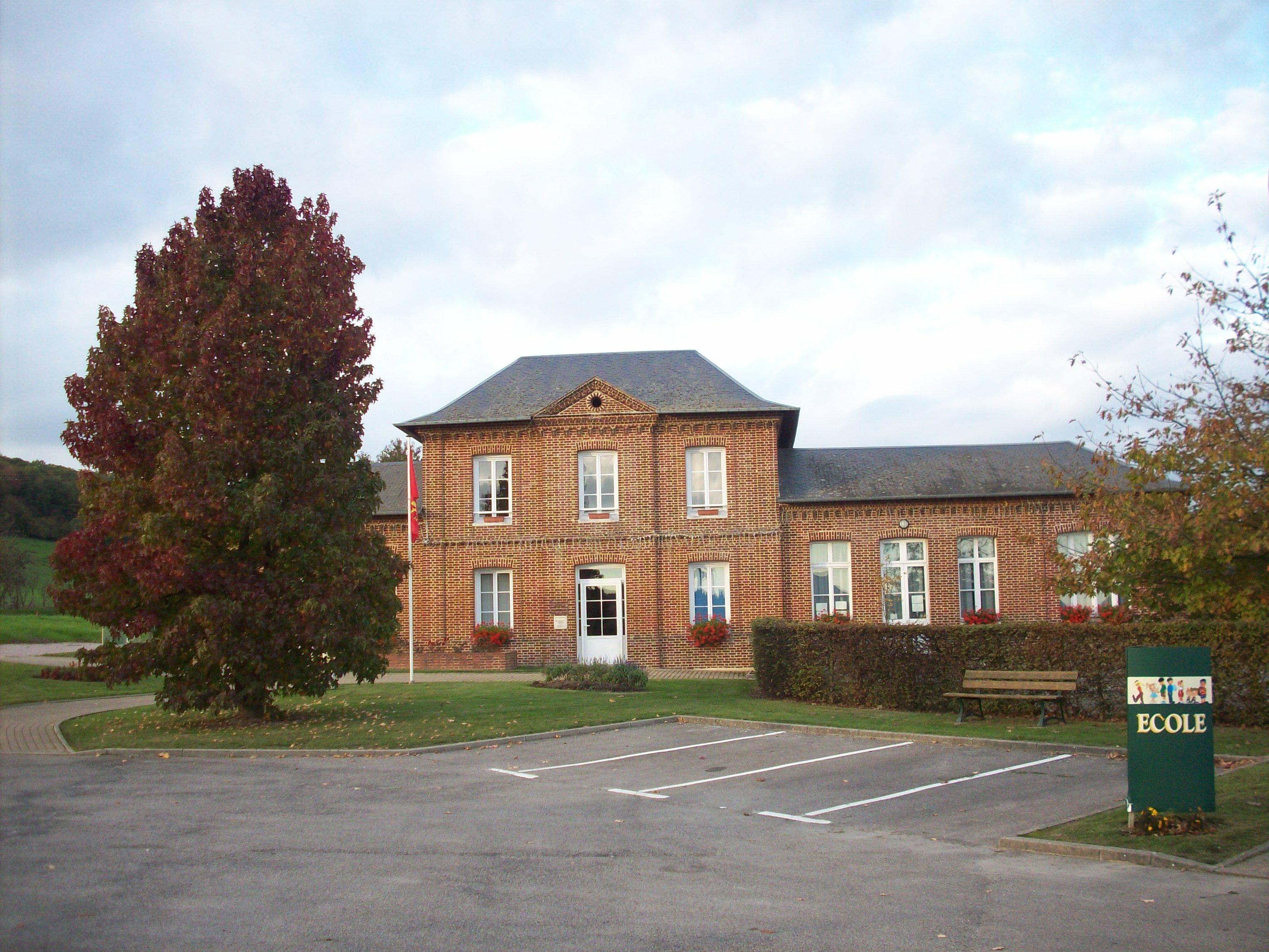 école communale et mairie de Perruel.